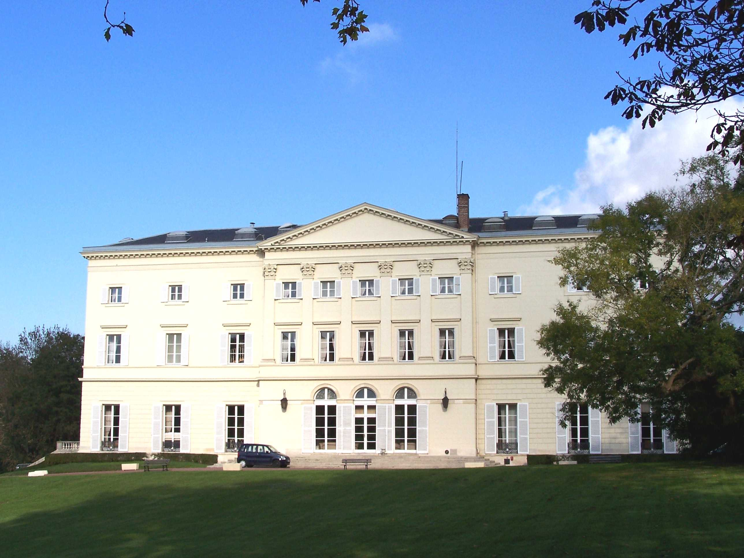 Château HEC-CRC à Jouy-en-Josas (Yvelines, France), centre de formation de HEC (Hautes Études Commerciales)